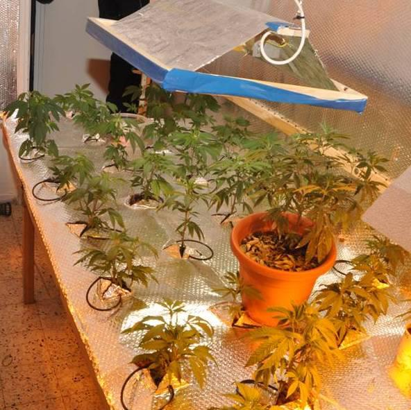 מעבדת סמים עם שתילי מריחואנה שנתפסה על ידי משטרת ישראל בדירה בתל אביב